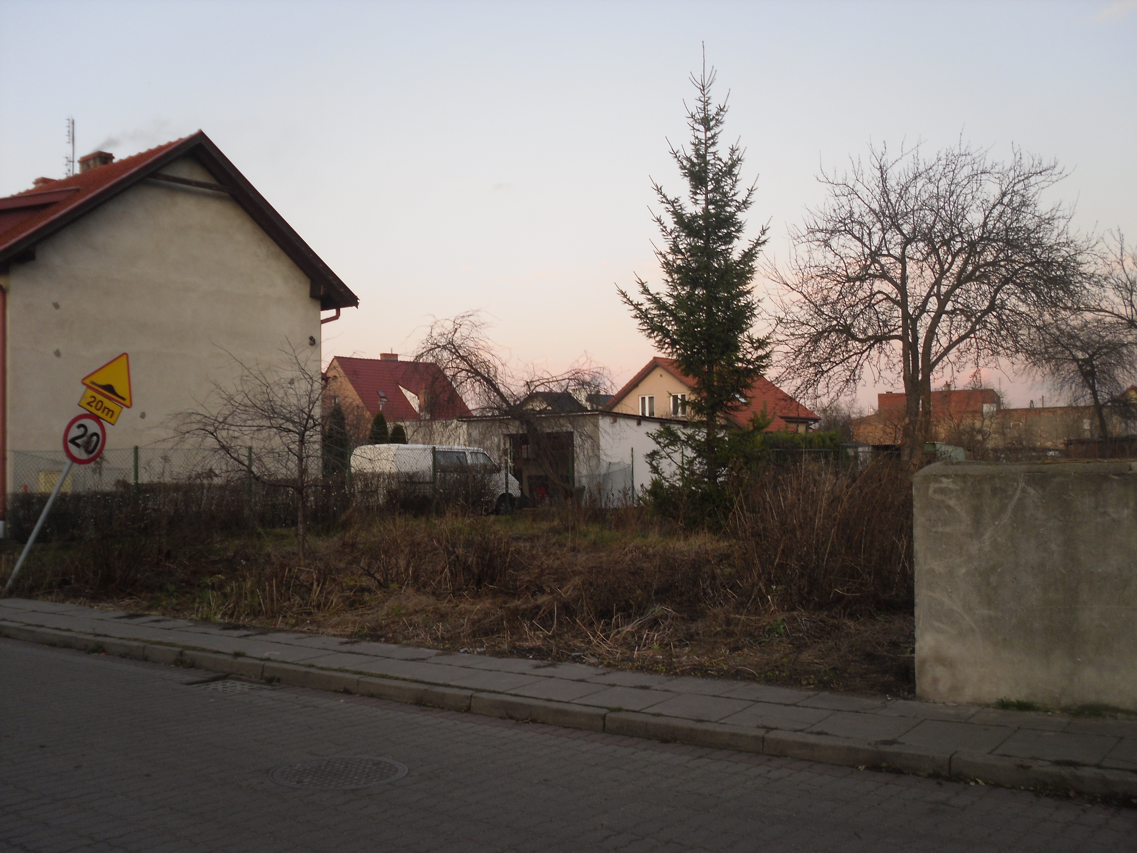 Gdańsk Wąskotorowy, 21 listopada 2009.